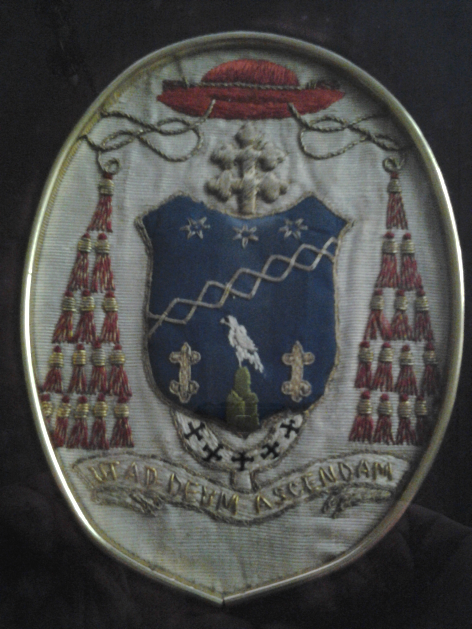 Stemma del Cardinale Alessio Ascalesi